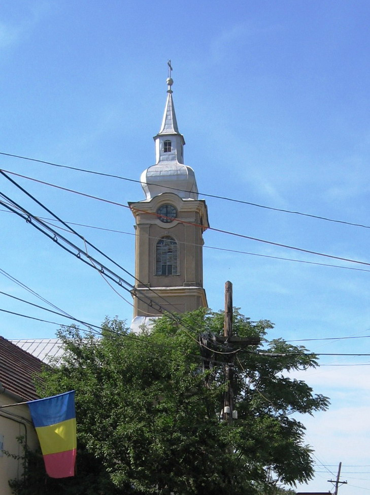 kat.templom